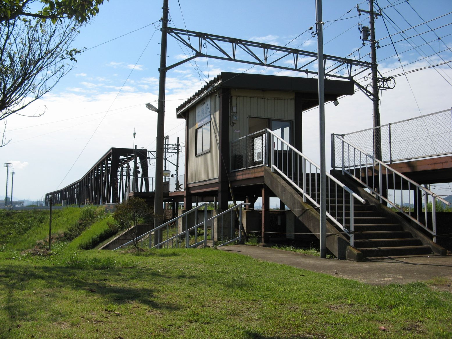 中角駅 背後に九頭竜川橋梁が見える